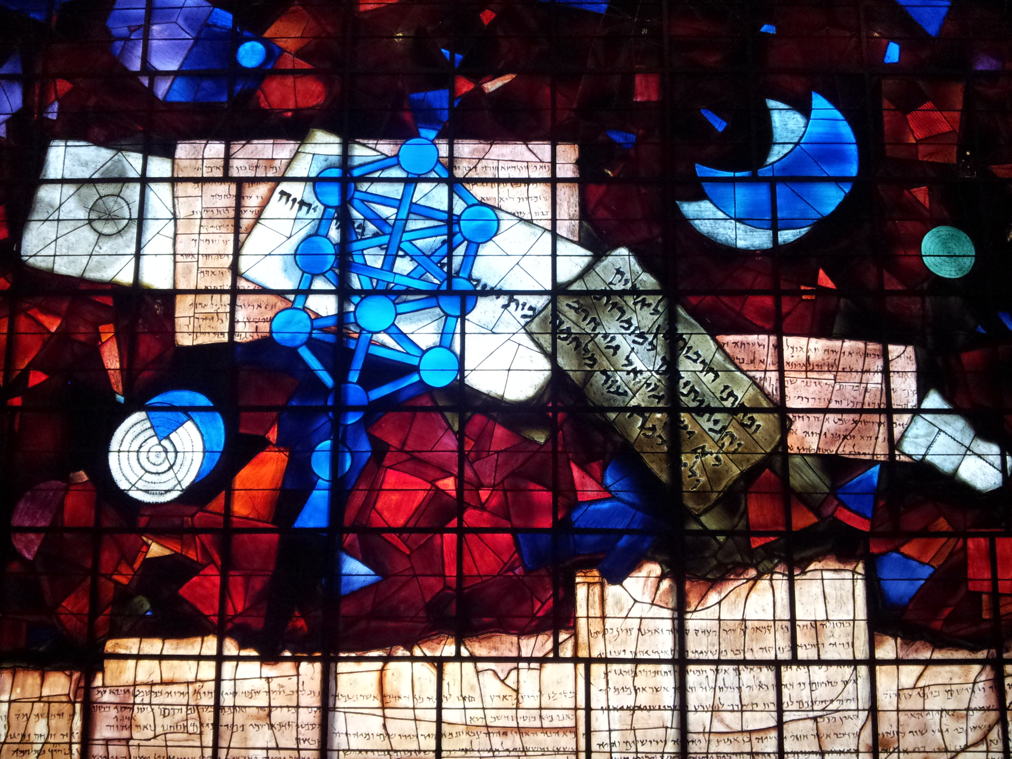 חלונות ארדון בספריה הלאומית - חלון אמצעי